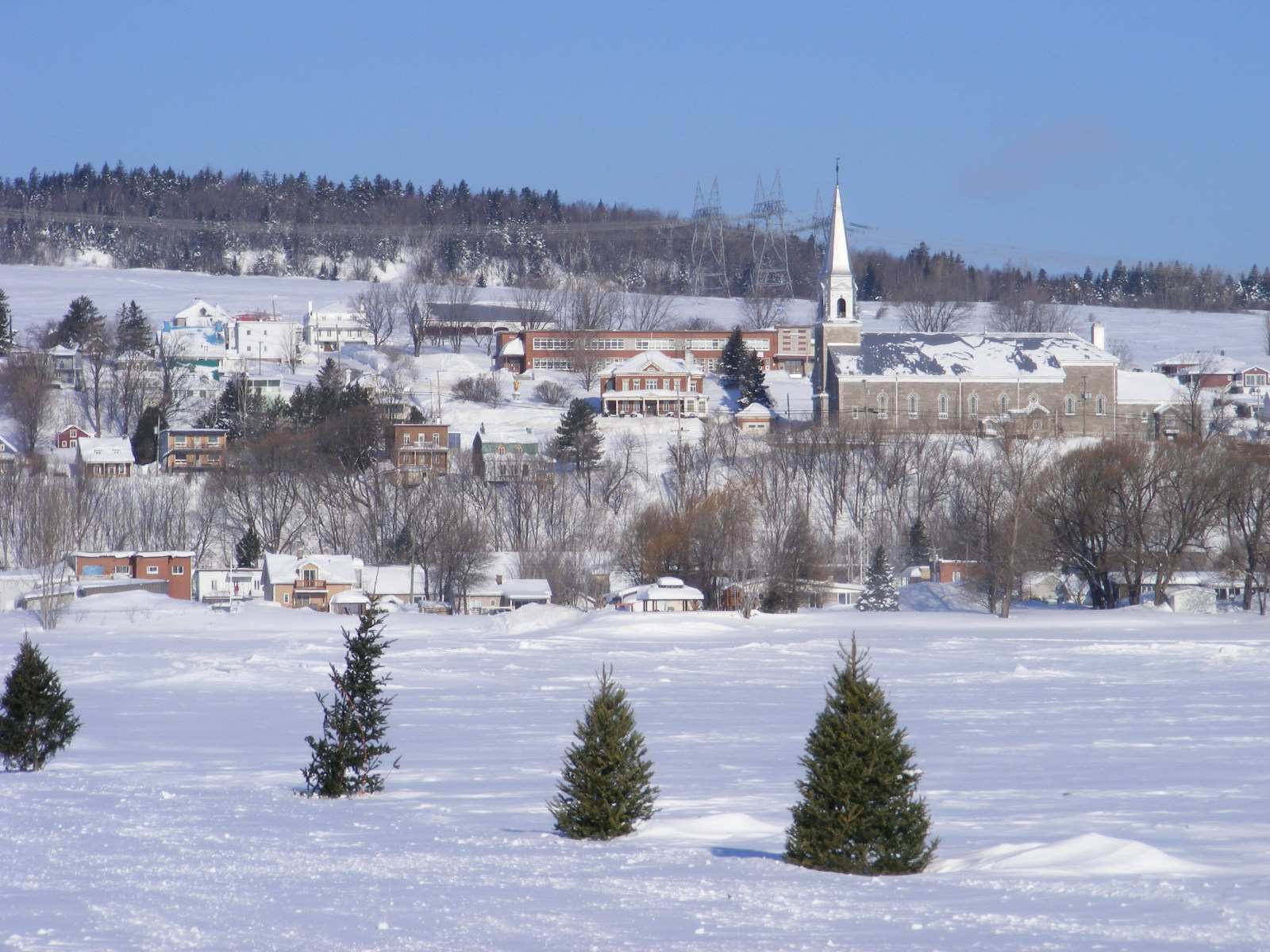 Municipalité de L'Ange-Gardien ( Côte de Beaupré ) en hiver à partir du pont de glace sur le fleuve.